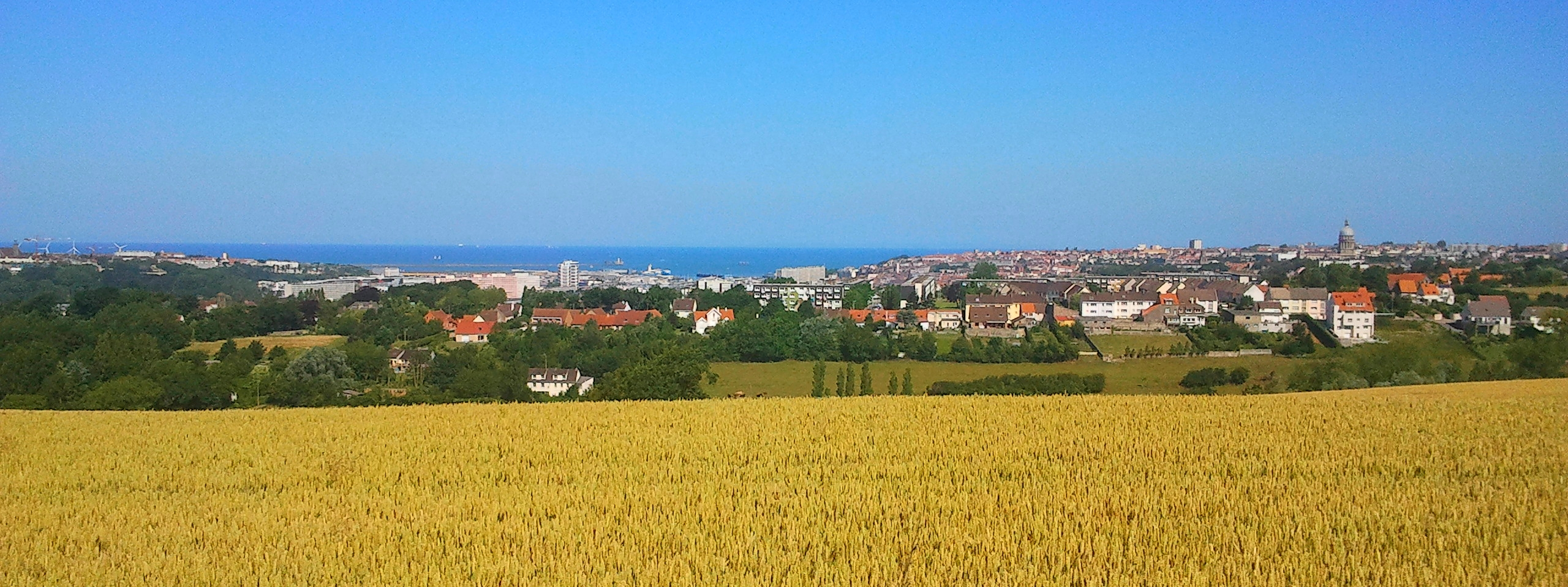 Vue générale de Boulogne-sur-Mer depuis Saint-Martin-Boulogne (62)